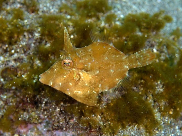 ヨソギ Paramonacanthus japonicus